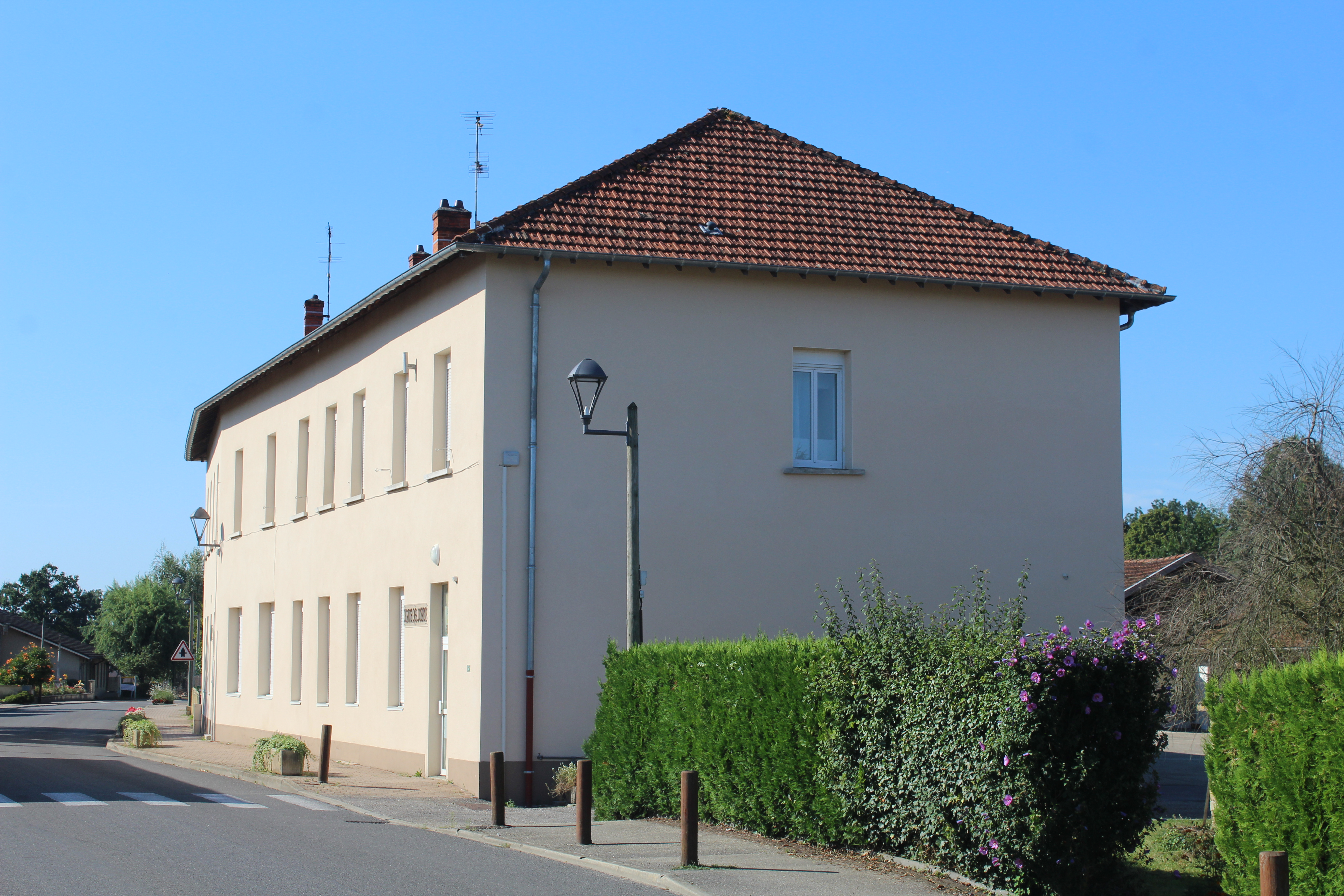 Bâtiment de l'école primaire de Saint-Didier-d'Aussiat.